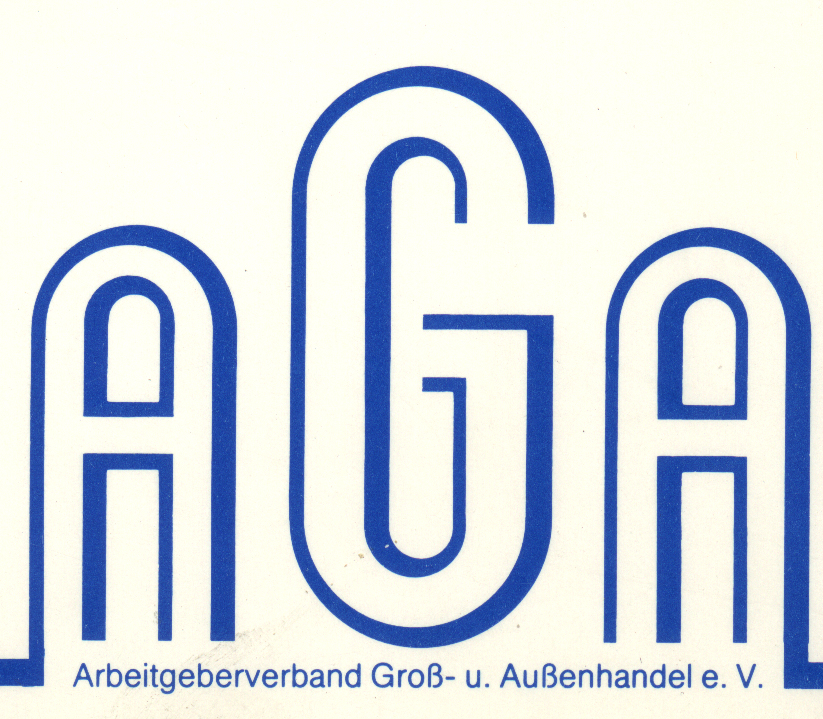 Das Logo des AGA Unternehmensverbandes von 1954